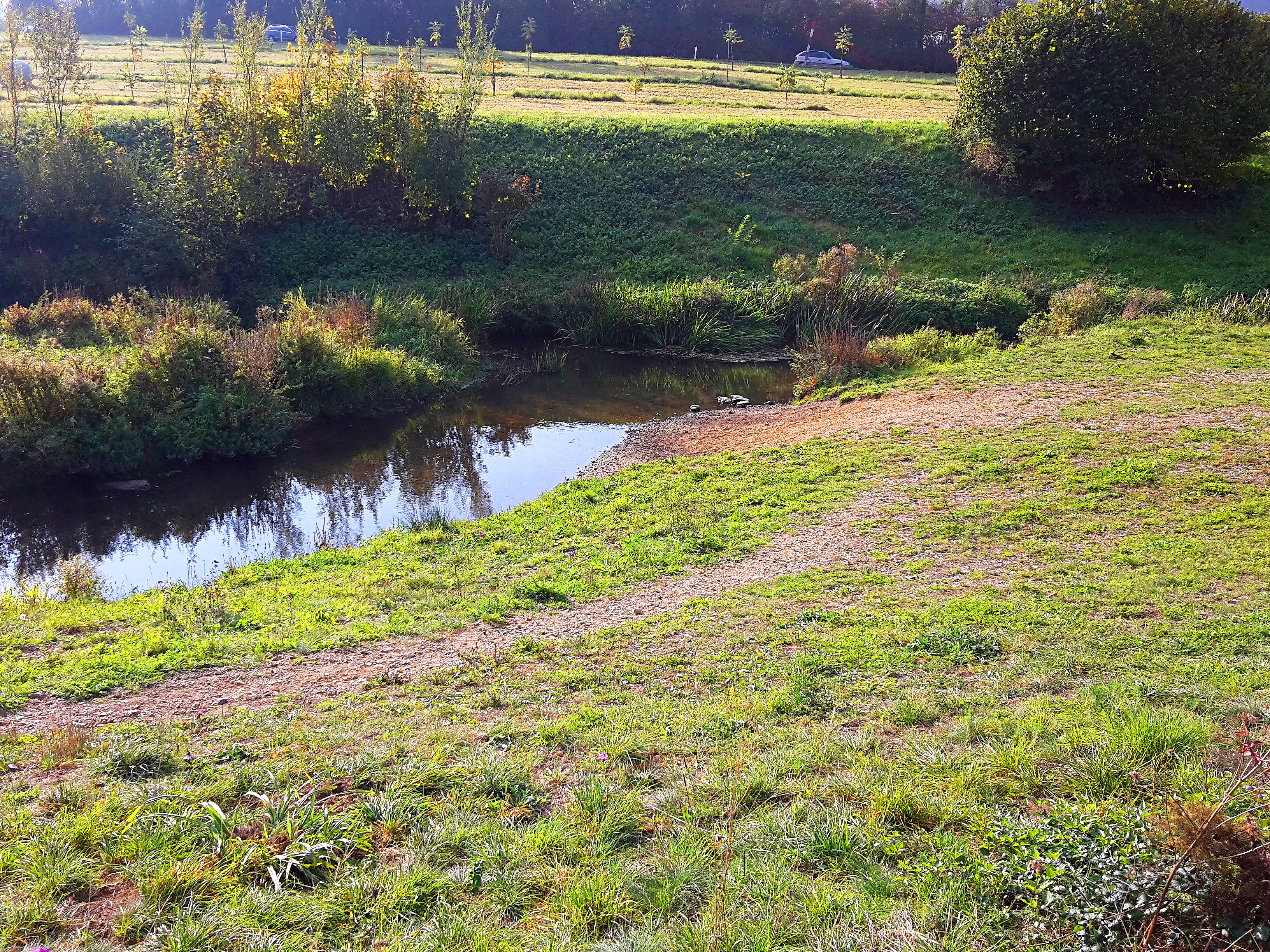 Furtbach bei Otelfingen